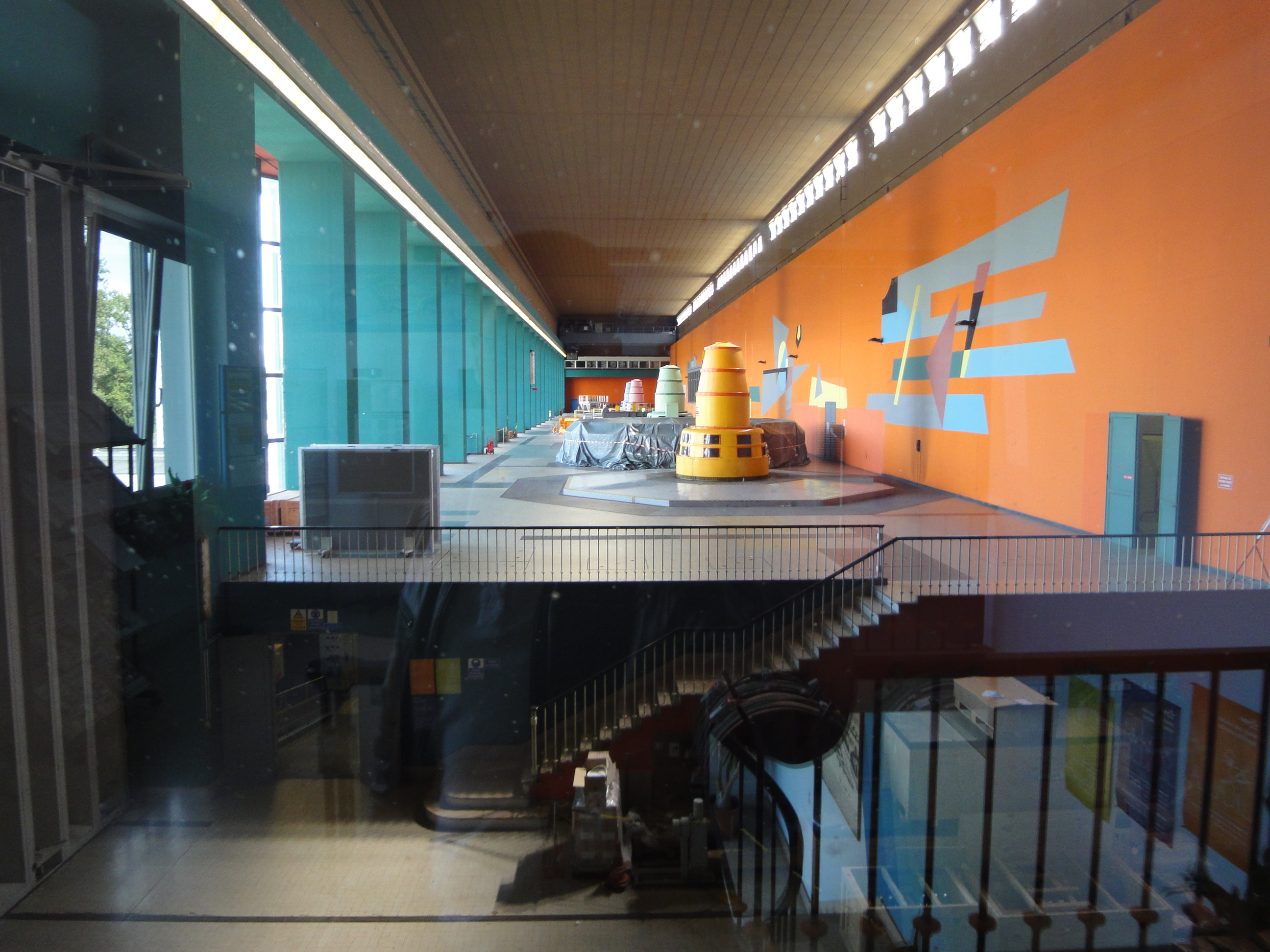 Salle des machines du barrage de Vogelgrün (Haut-Rhin), sur le Grand canal d'Alsace.